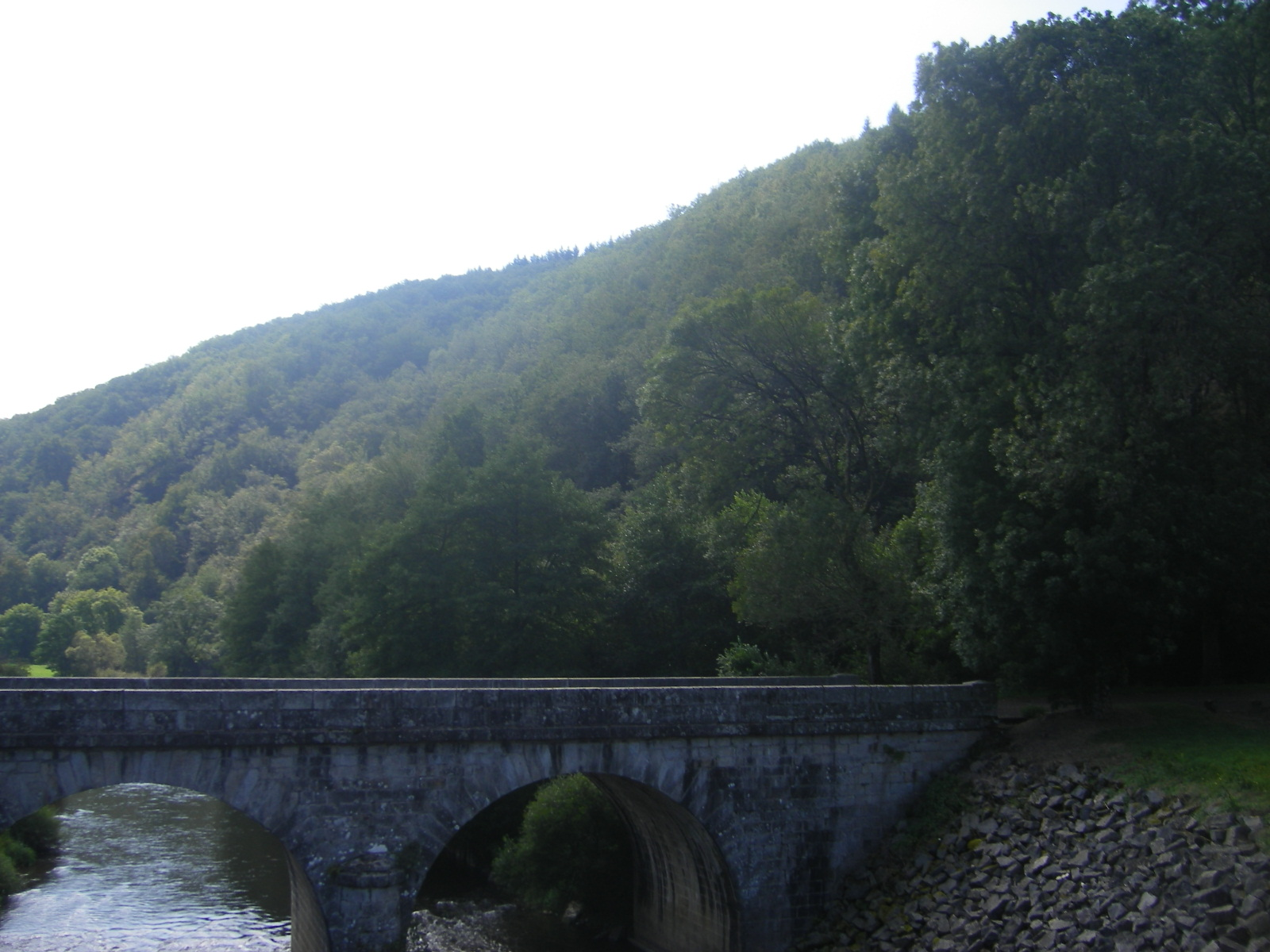 Pont du Laurent at the Cère River